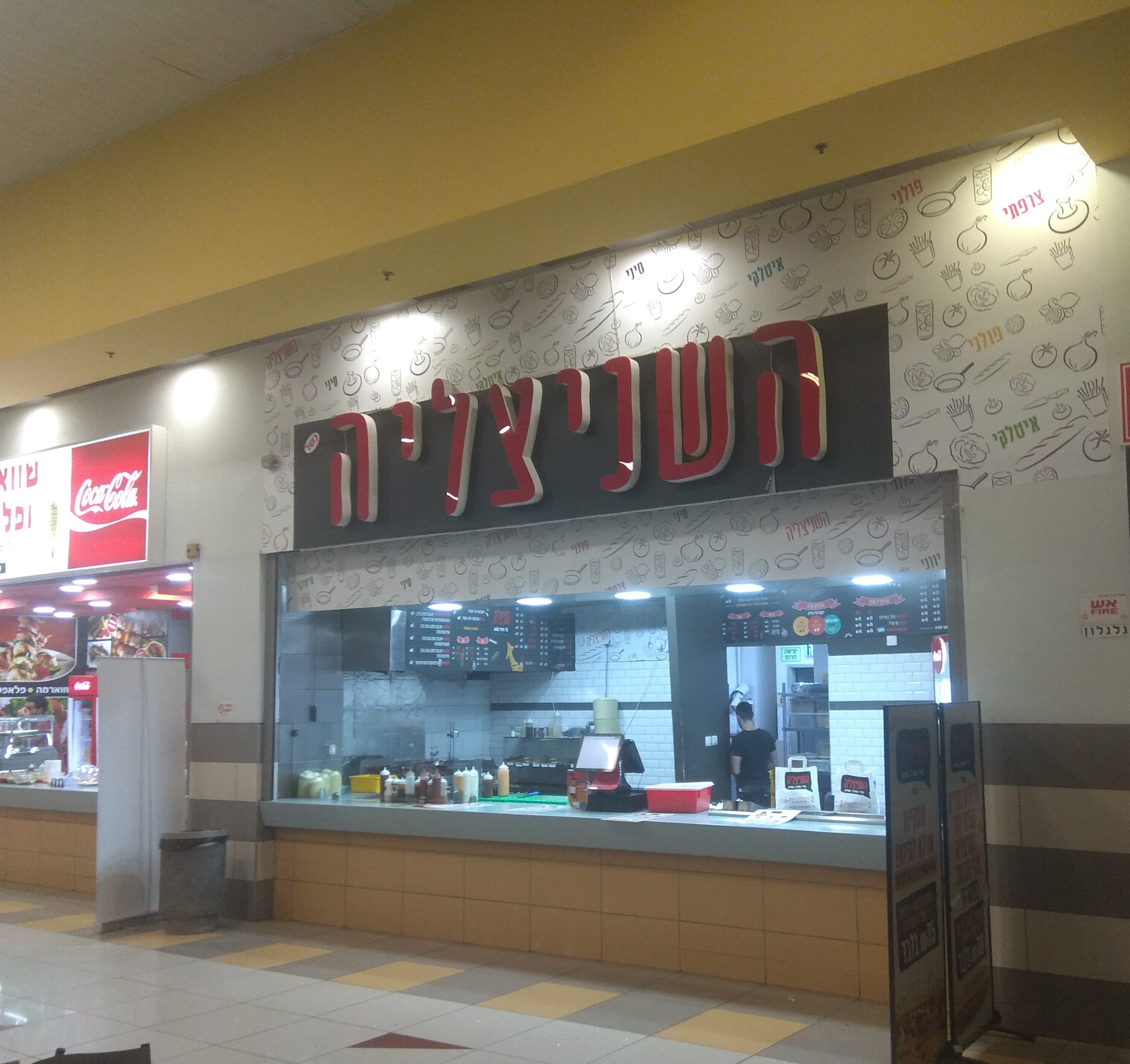 סניף הרשת בתחנה מרכזית חוף הכרמל